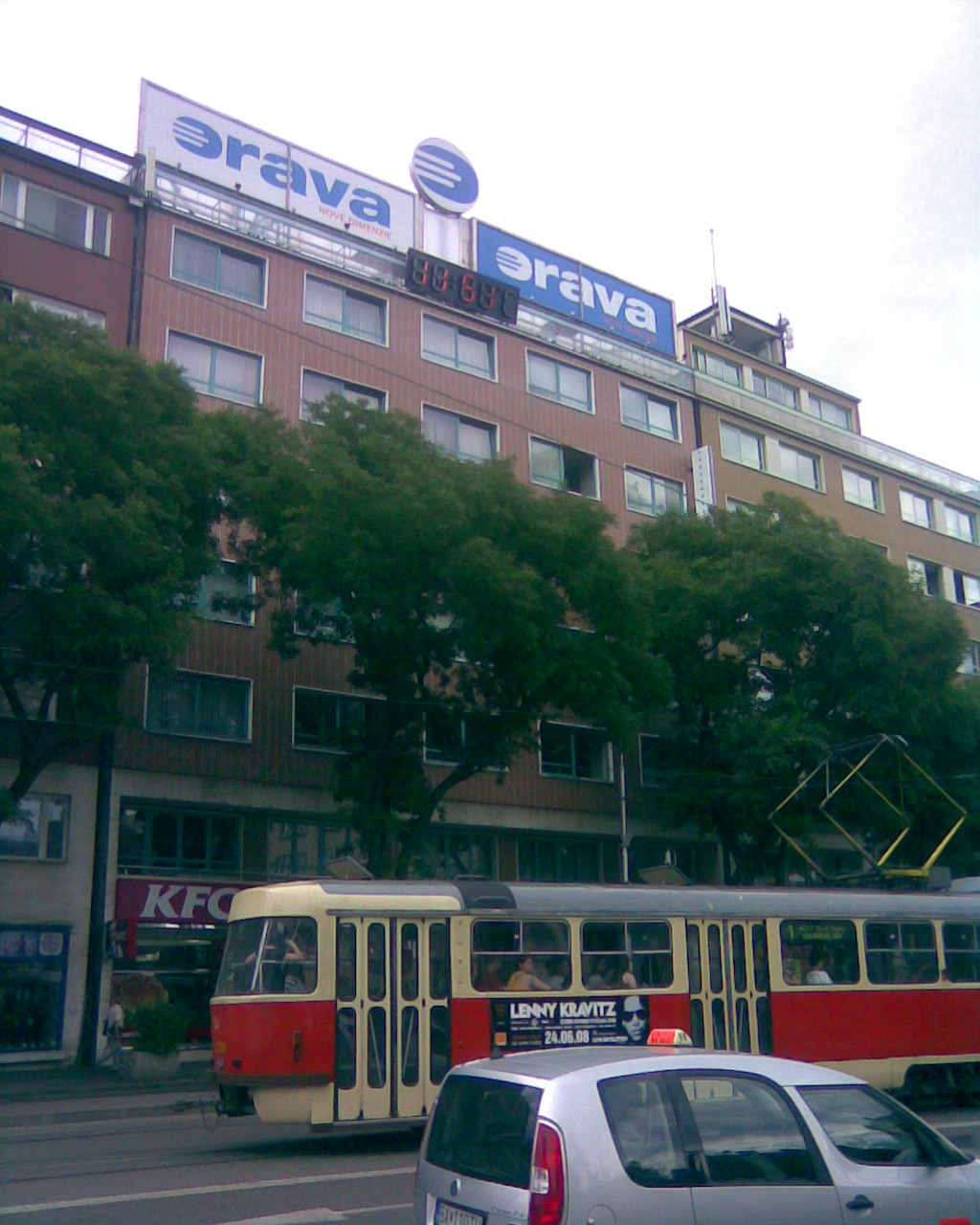 Družstevné_domy_na_Námestí_SNP